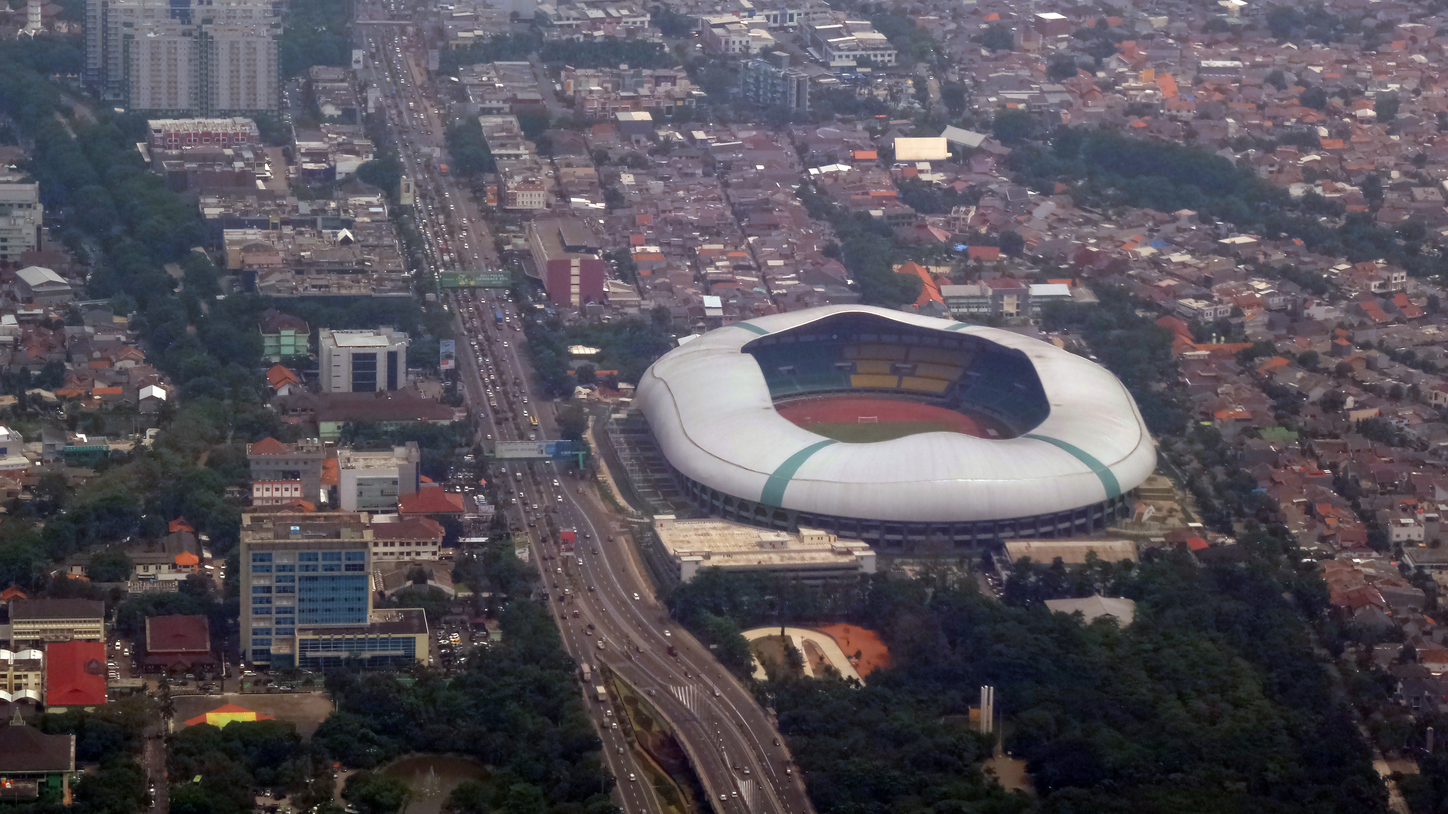 Updated 1 June 2017. God Save Our Pancasila. Biasanya bernama Stadion Patriot. Kandang dari PS Bhayangkara dan (sementara) Persija Jakarta. Officially named Stadion Patriot. Current home for PS Bhayangkara and temporary home for Persija Jakarta.